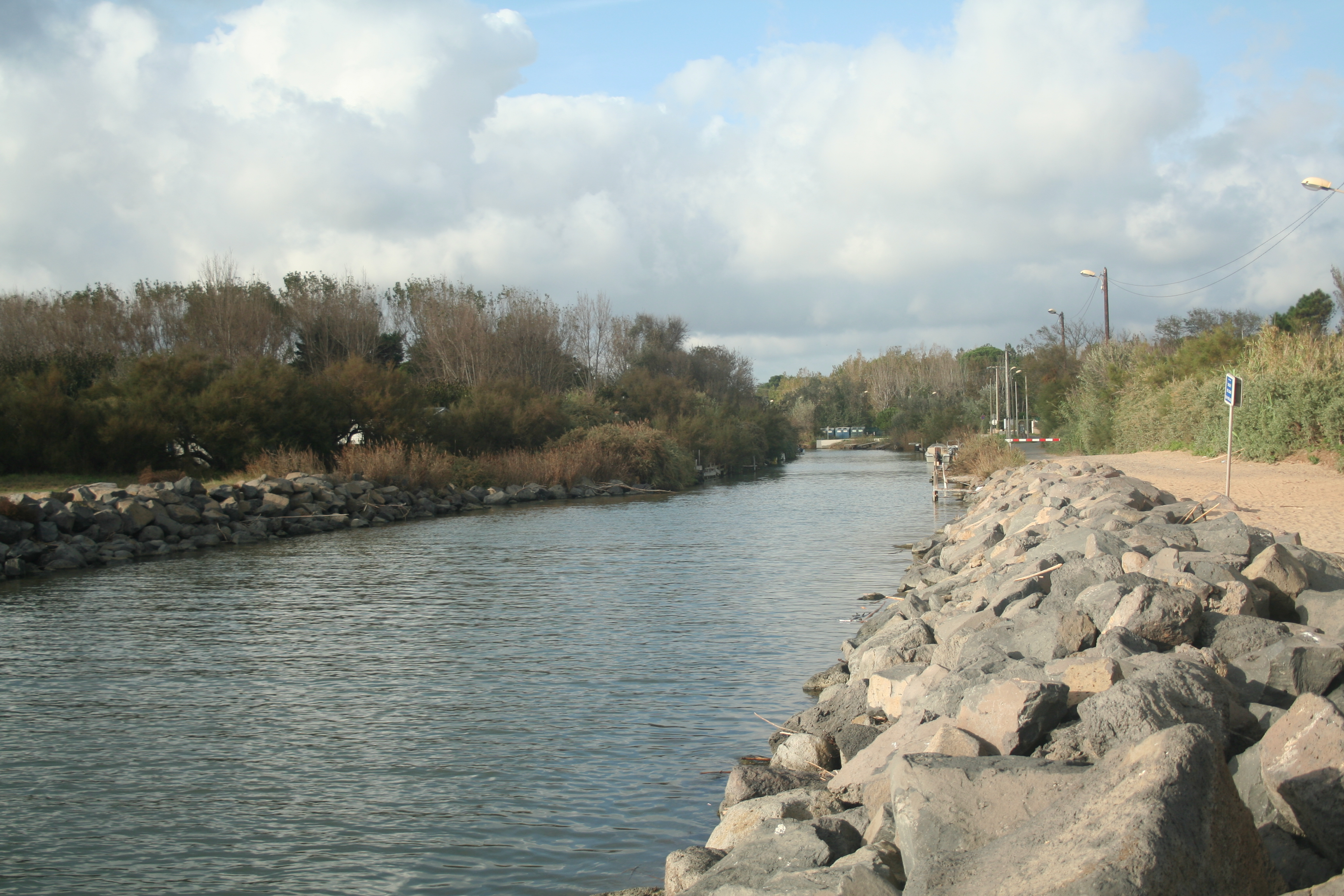 Vias (Hérault, Languedoc-Roussillon, France) - cours du Libron près de son embouchure dans la Méditerranée.